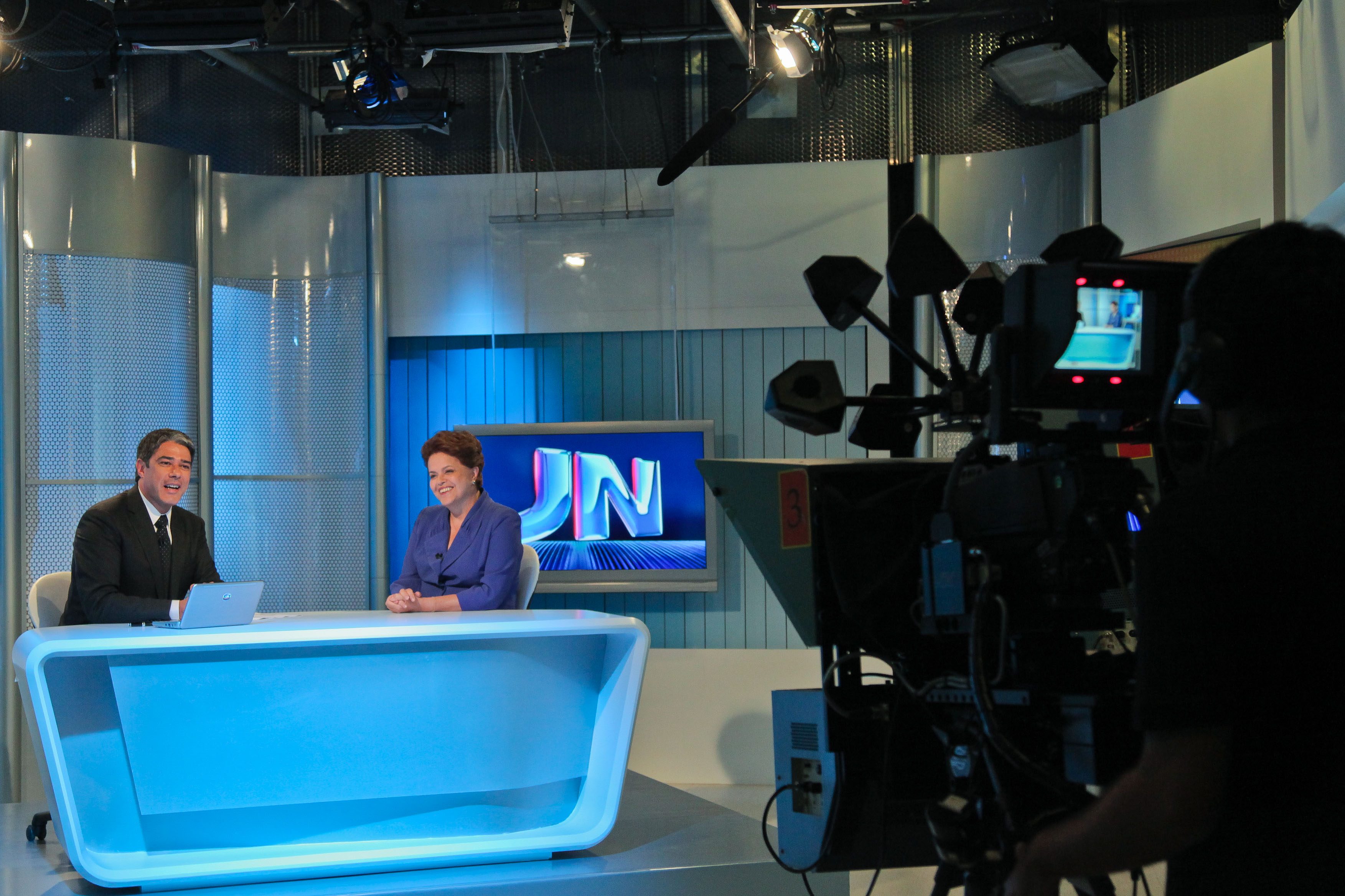 O jornalista brasileiro William Bonner entrevistando a então candidata à presidência da república, Dilma Rousseff, na bancada do Jornal Nacional.